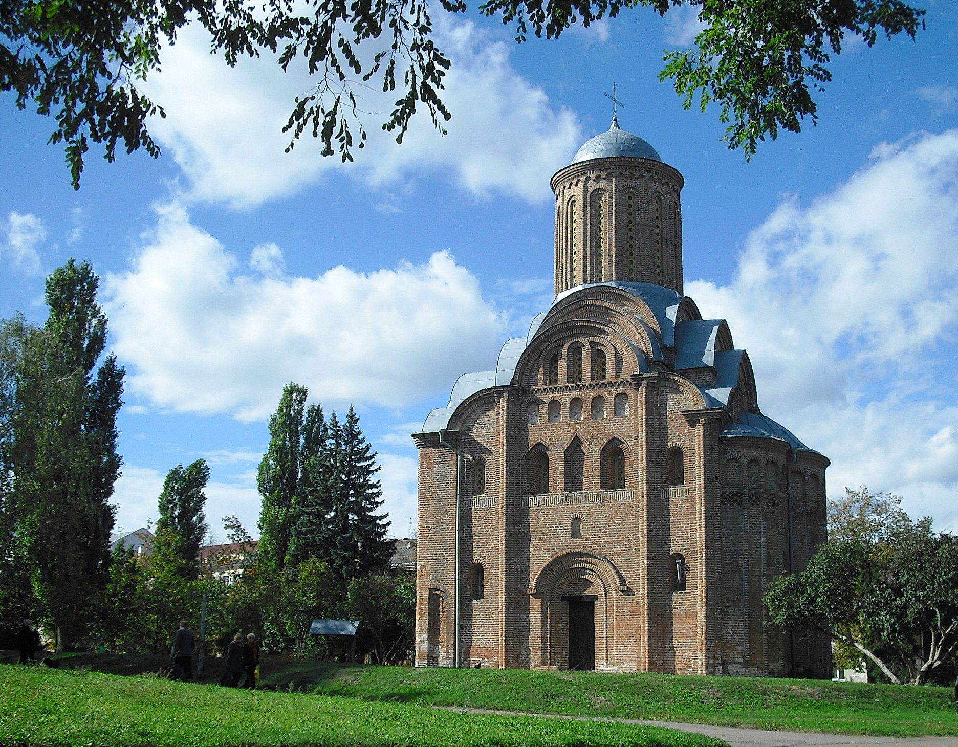 П'ятницька церква (мур.), Чернігів, вул.гетьмана Полуботка, 3